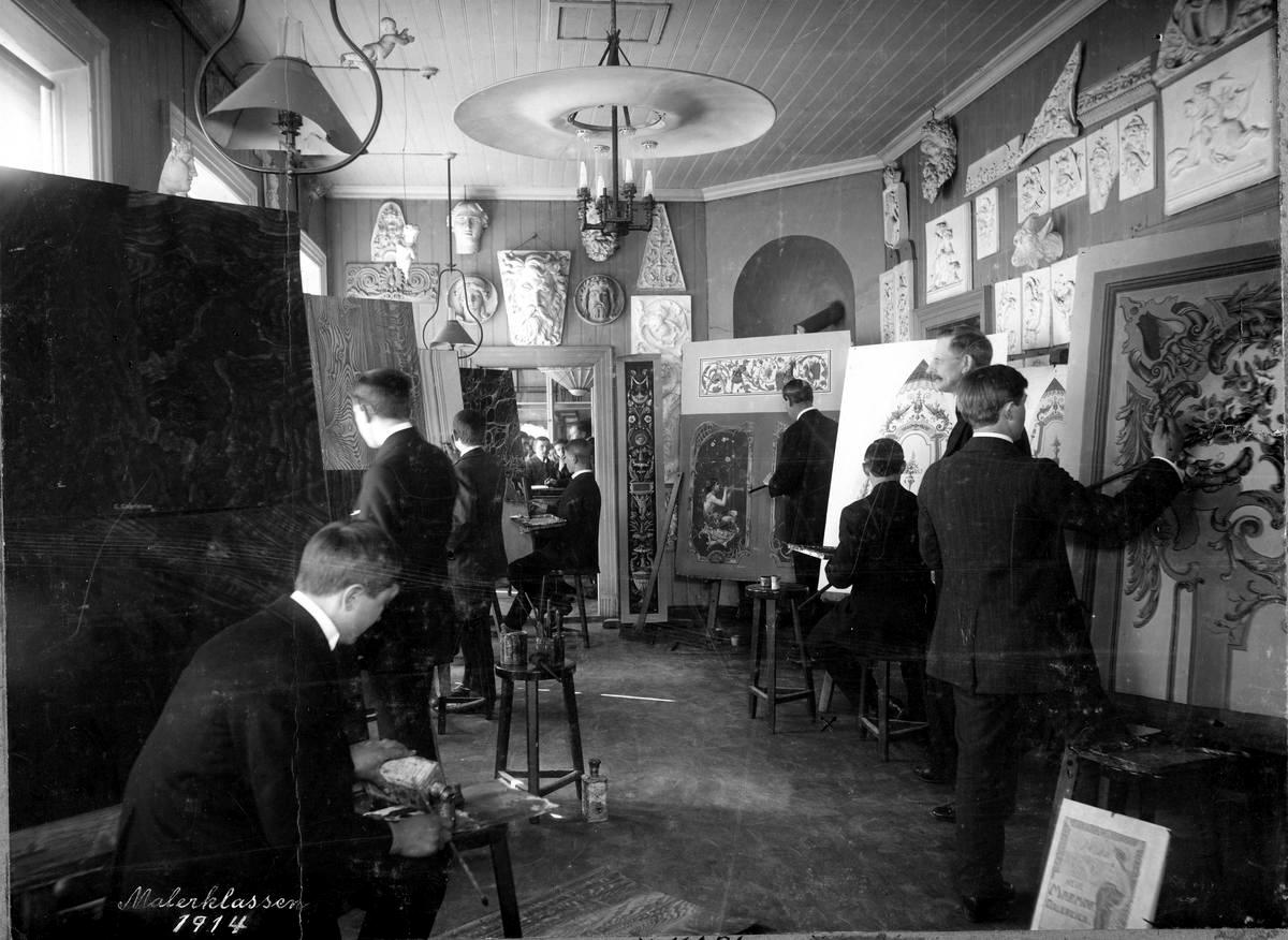 Malerklassen ved Kristiansand tekniske aftenskole 1914